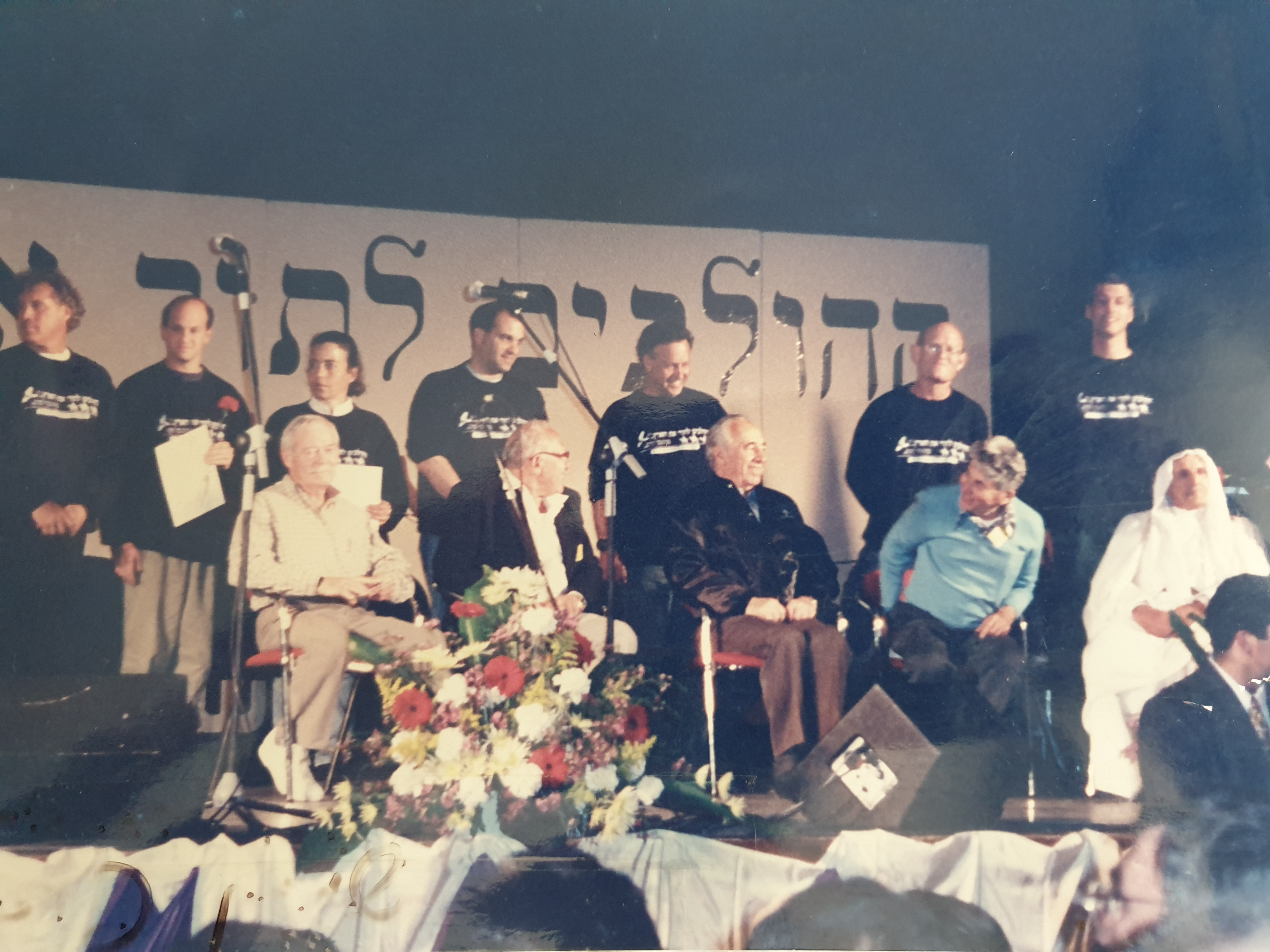 ההולכים לתור את הארץ טקס פתיחת שחזור המסע